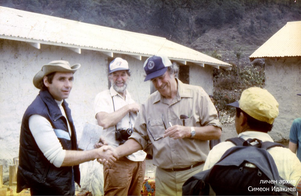 Среща с Едмънд Хилари / Непал /